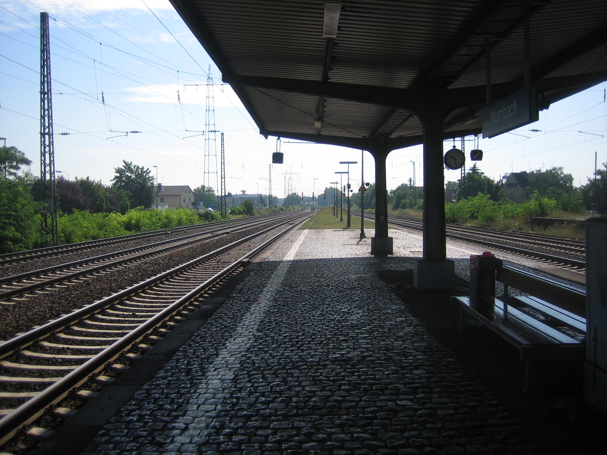 Bahnhof Mombach, westlichster Punkt des Gleisdreiecks Mainz-Nord, der Umgehungsbahn Mainz.